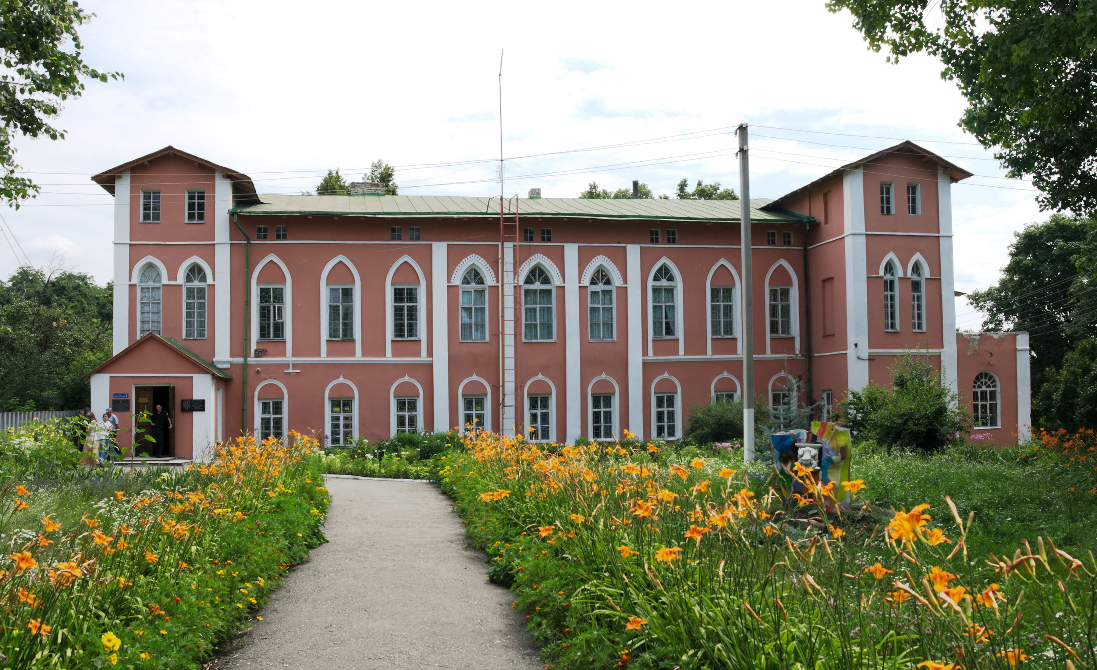 Палац Підгоричани (нині — музей), Пархомівка